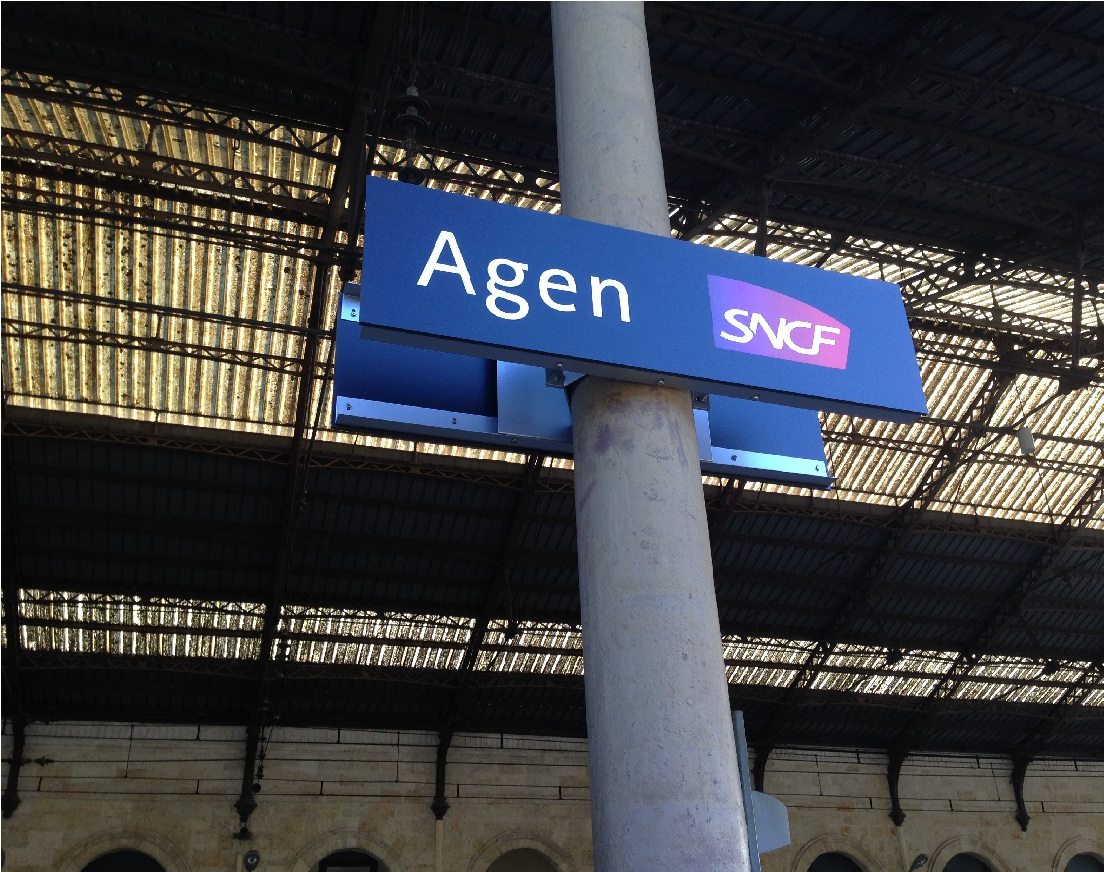 Panneau de la gare d'Agen-2014